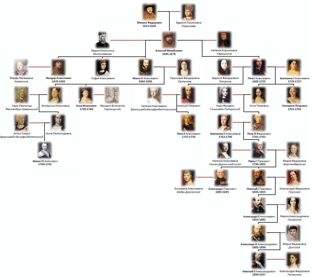 Основные представители Дома Романовых